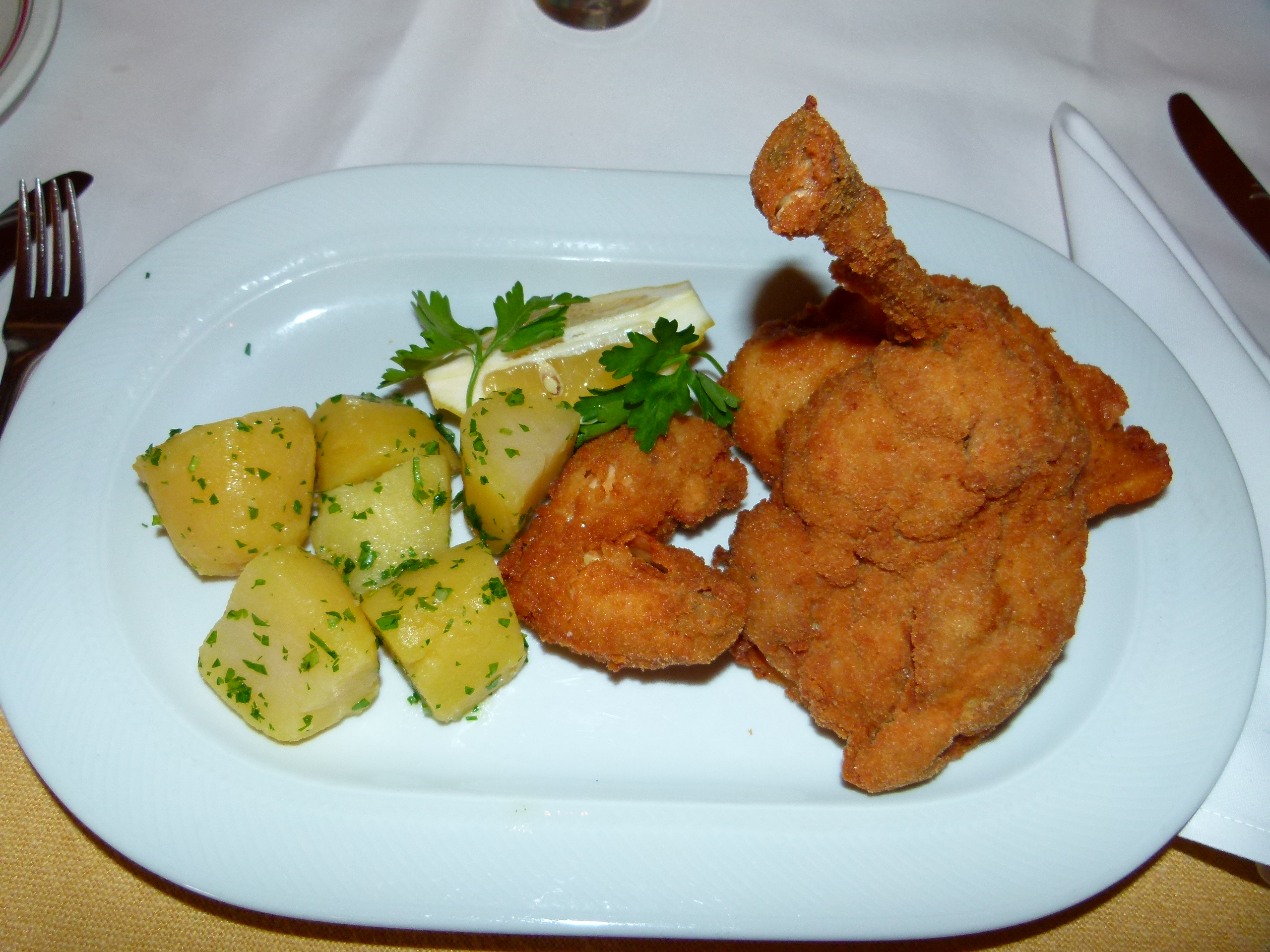 Backhendl, Restaurant Jägerwirt, Wien